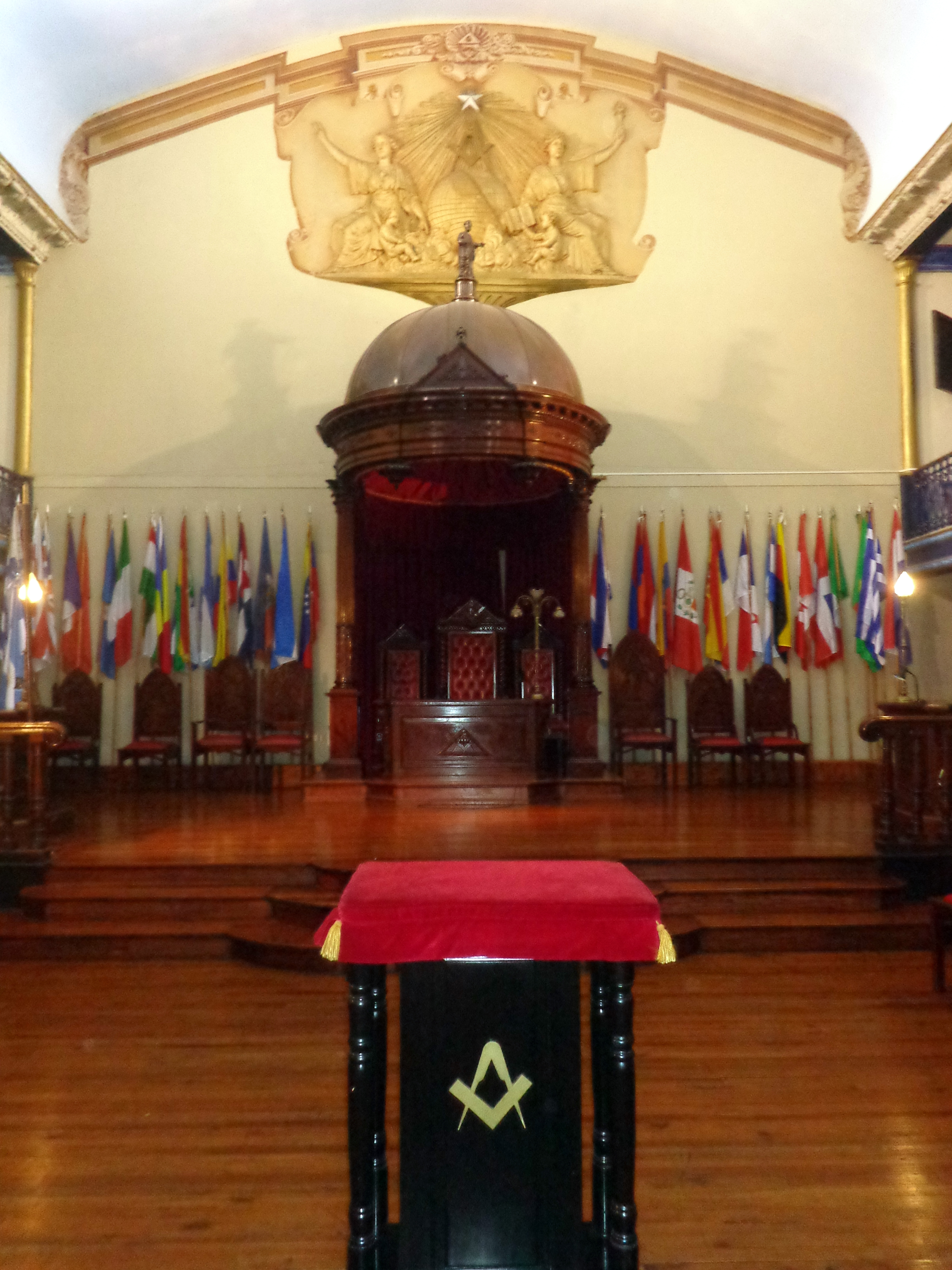 Sede de la Gran Logia Argentina de Libres y Aceptados Masones fue inaugurada el 3 de marzo de 1872. Calle Tte. Gral. Perón 1242, Barrio de San Nicolás, Buenos Aires, Argentina.